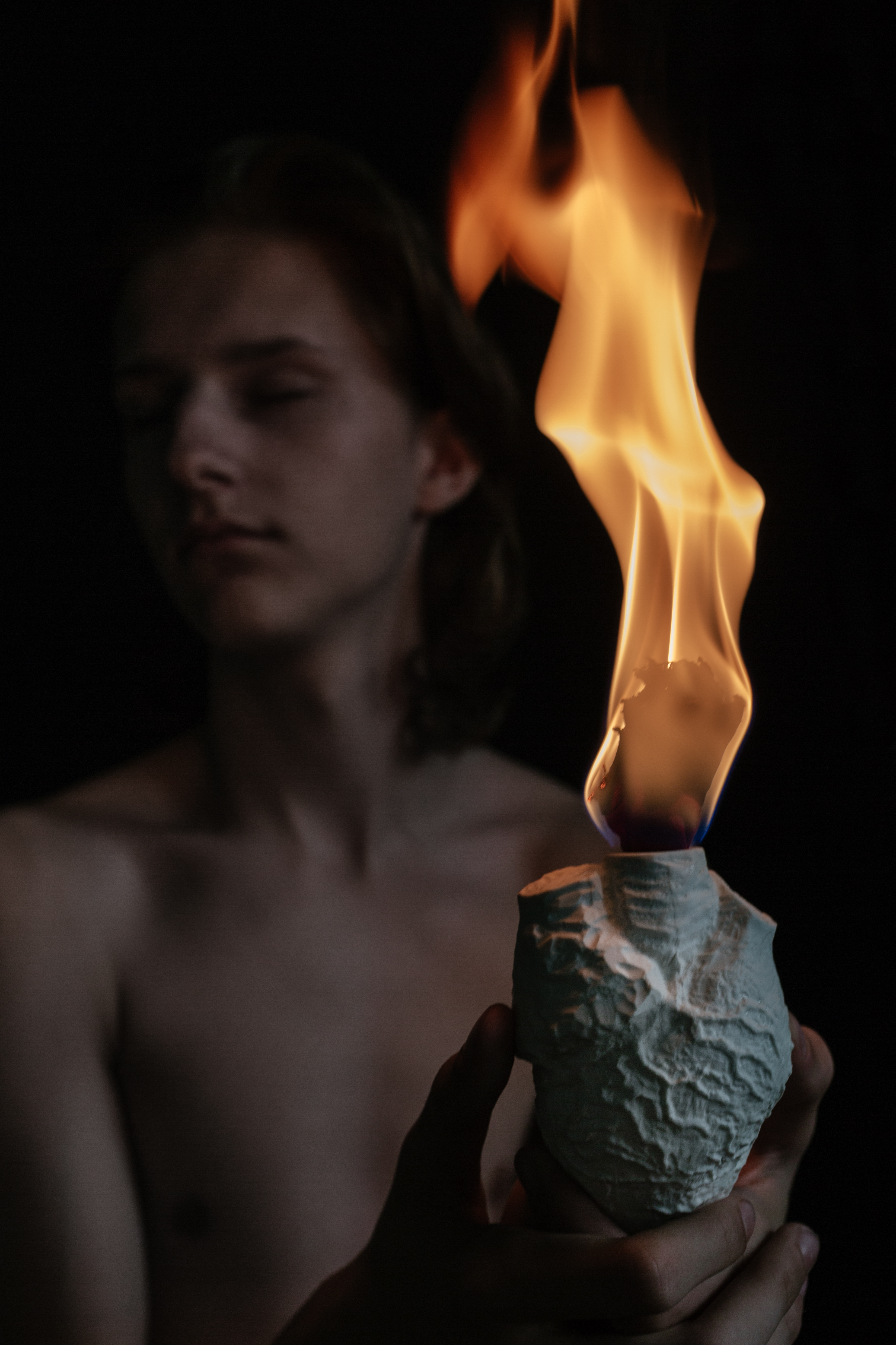 Mortal kombat: Love